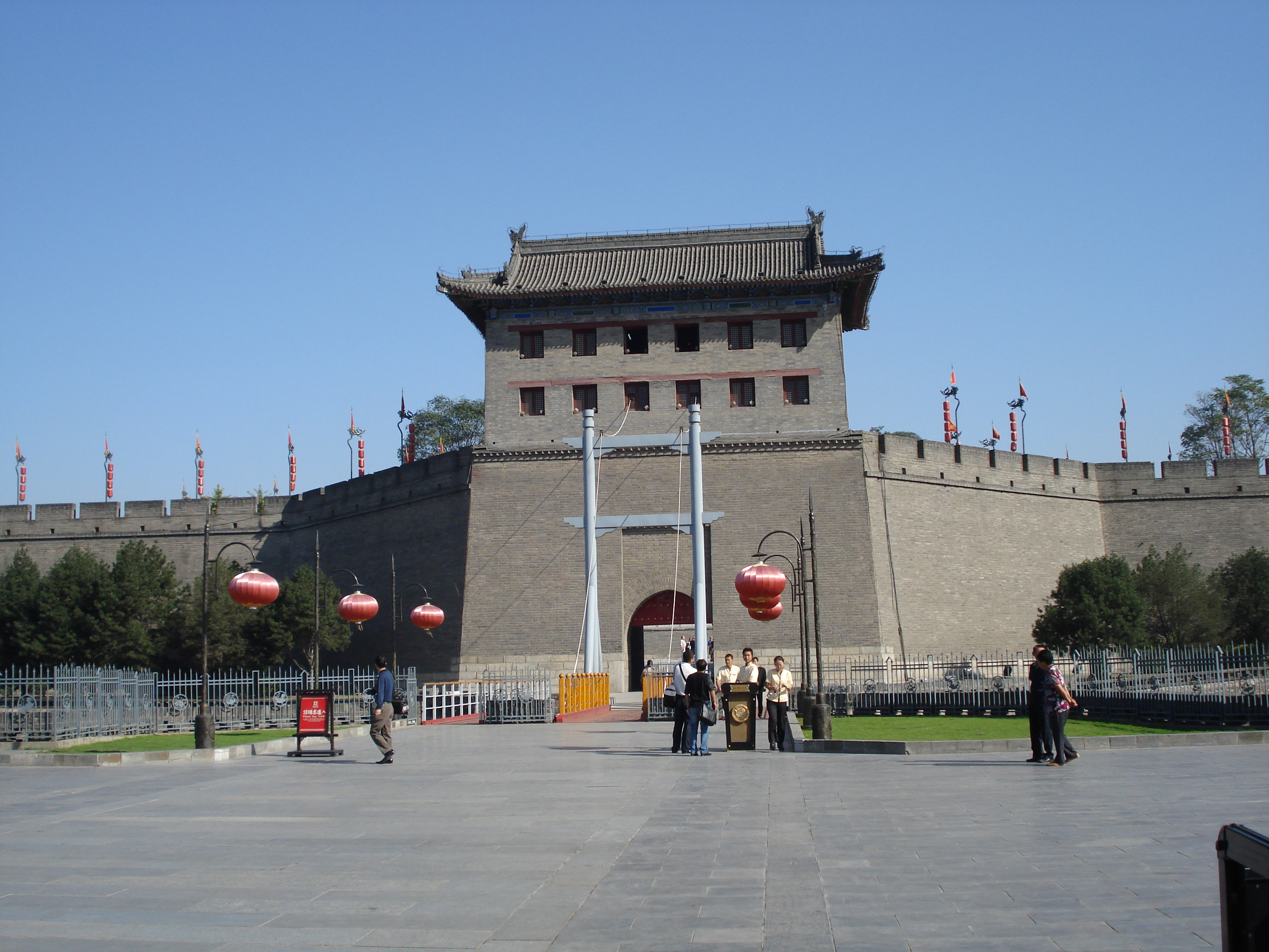 Xi'an, mury obronne - brama południowa